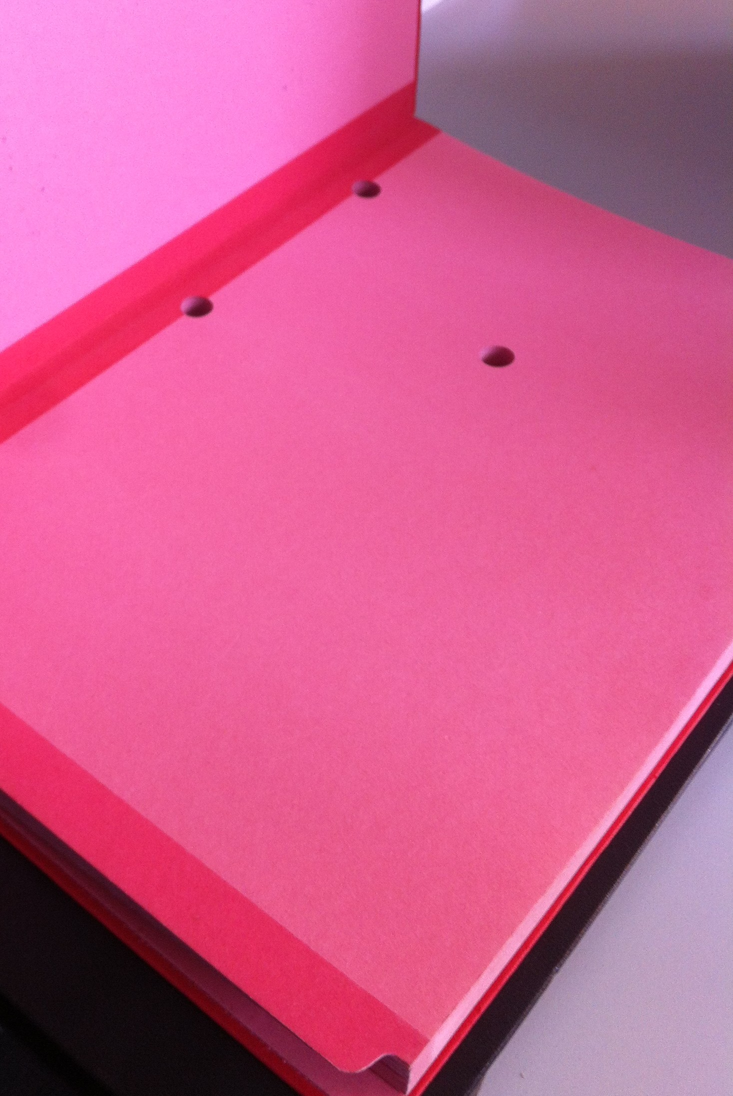 Rote Unterschriftenmappe aus dem Büro